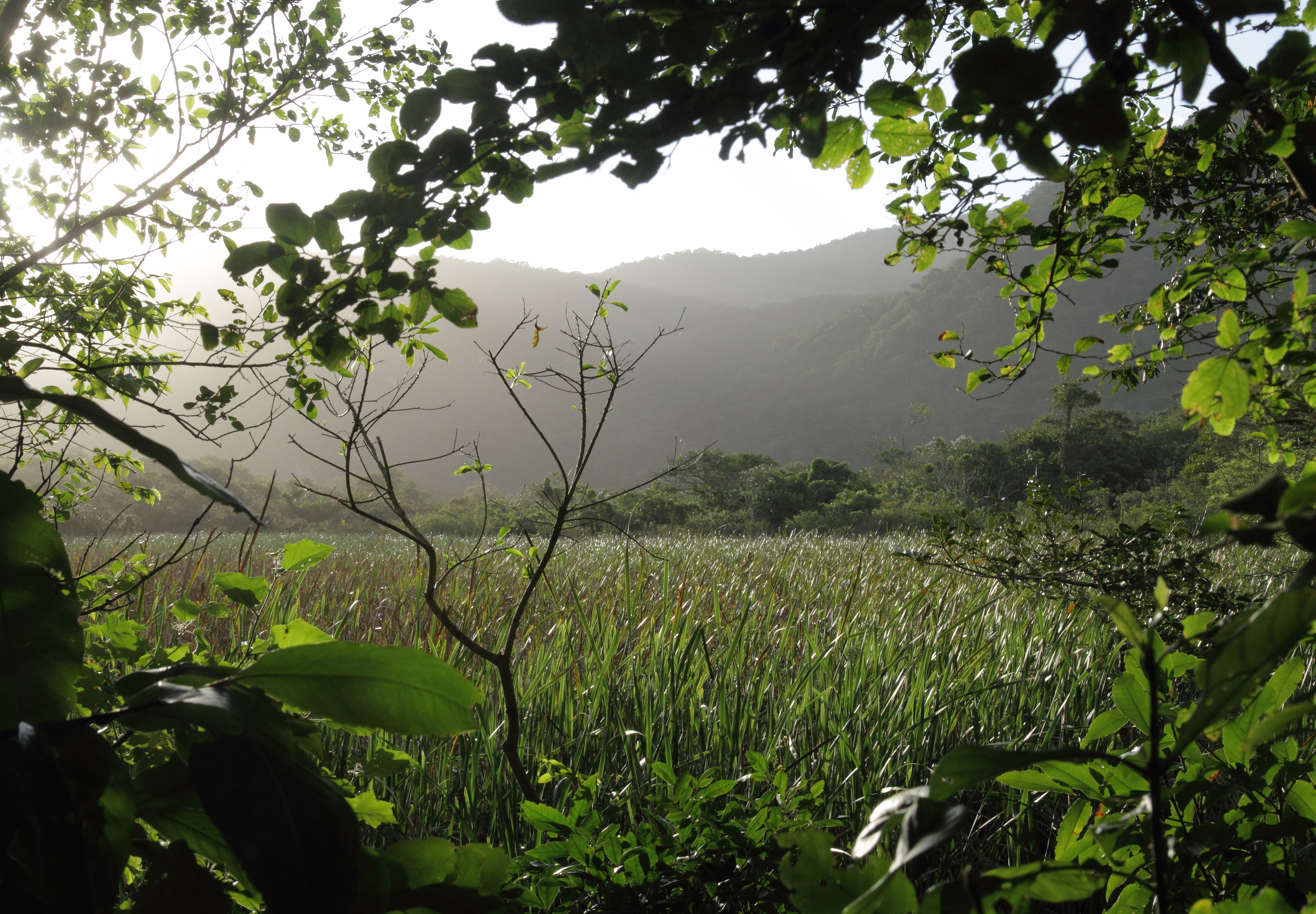 Entre o mar e os morros, pouco antes da saida do rio para o mar, a formação de um pequeno pantâno.